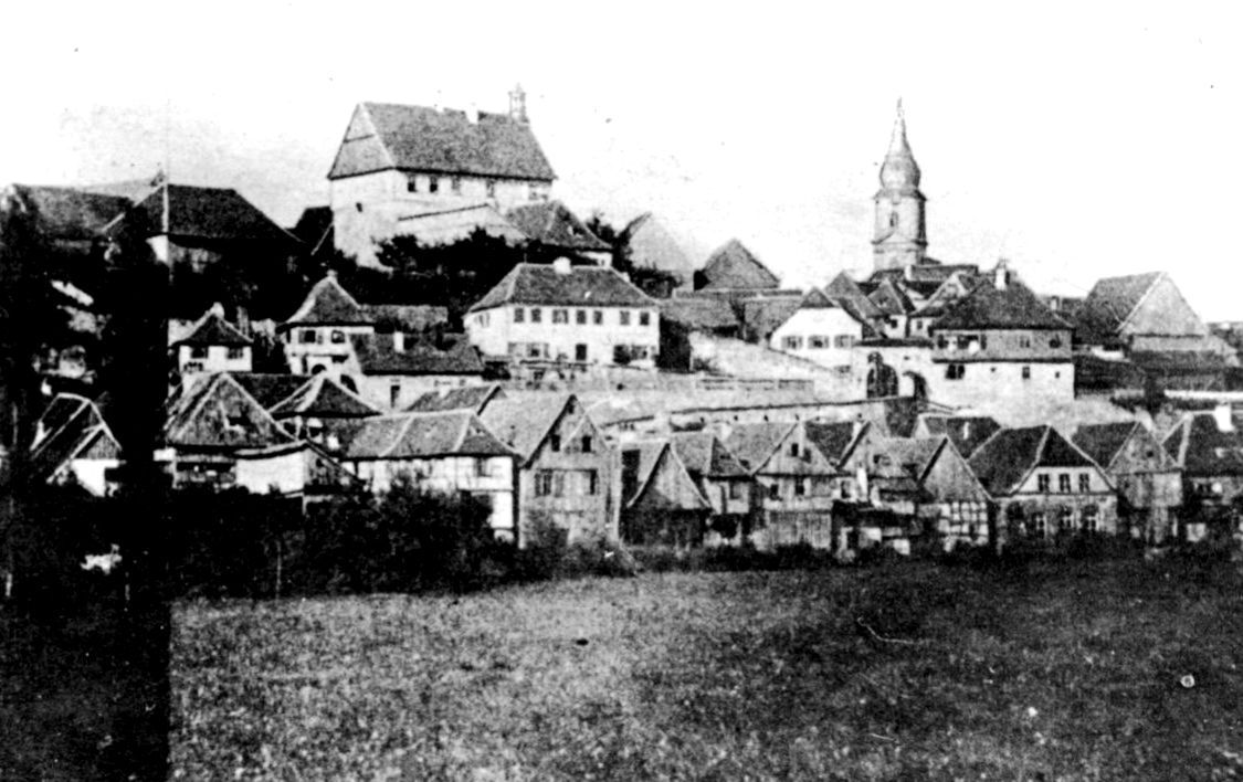 Blick auf die Burgkunstadter Oberstatd. In der rechten Bildhälfte, unterhalb des Kirchturmes ist das Lendtor und die Stadtmauer zu sehen.